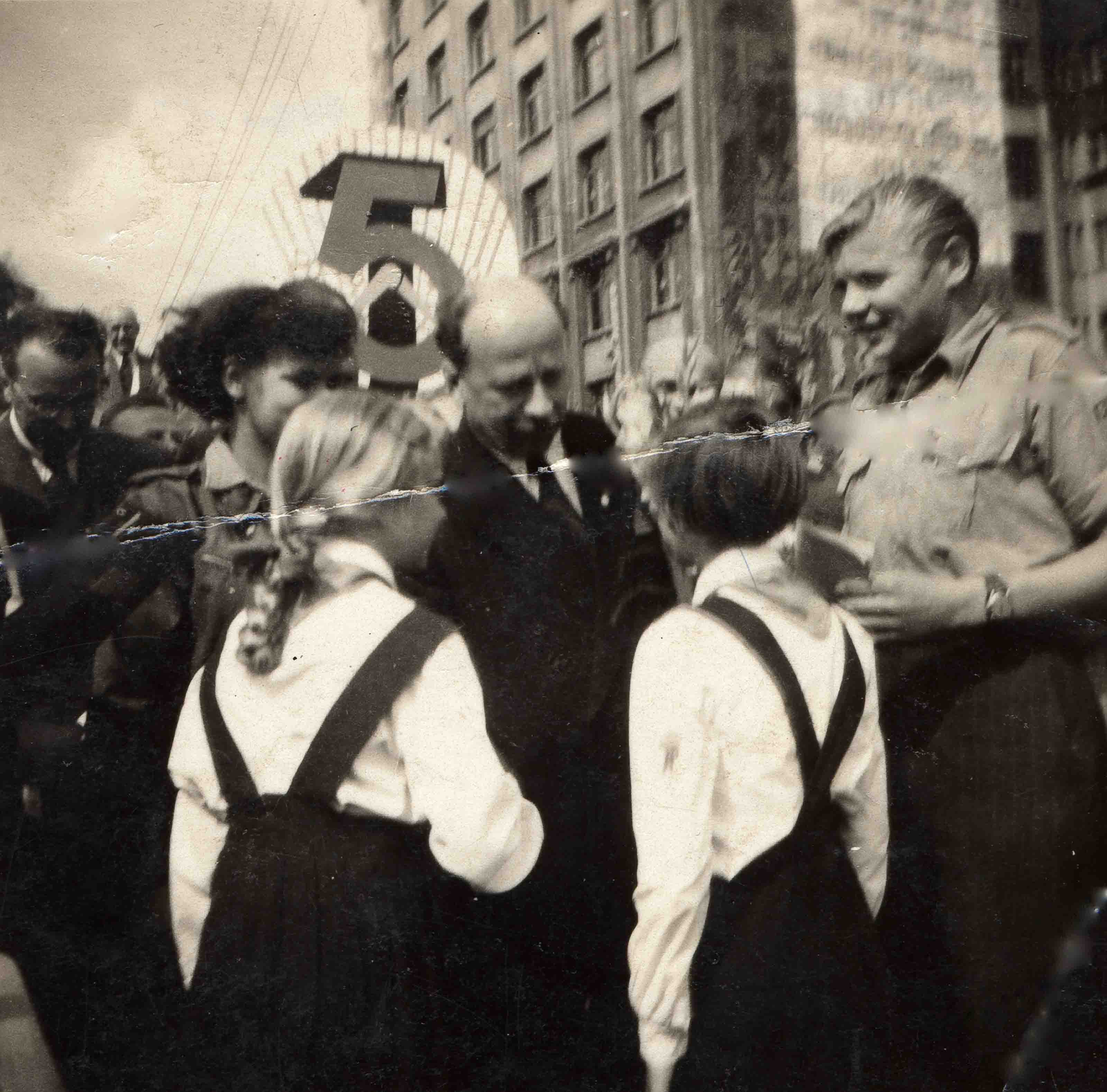 Helmut Komp neben Walther Ulbricht 1951 Einweihung der Ringbebauung Leipzig